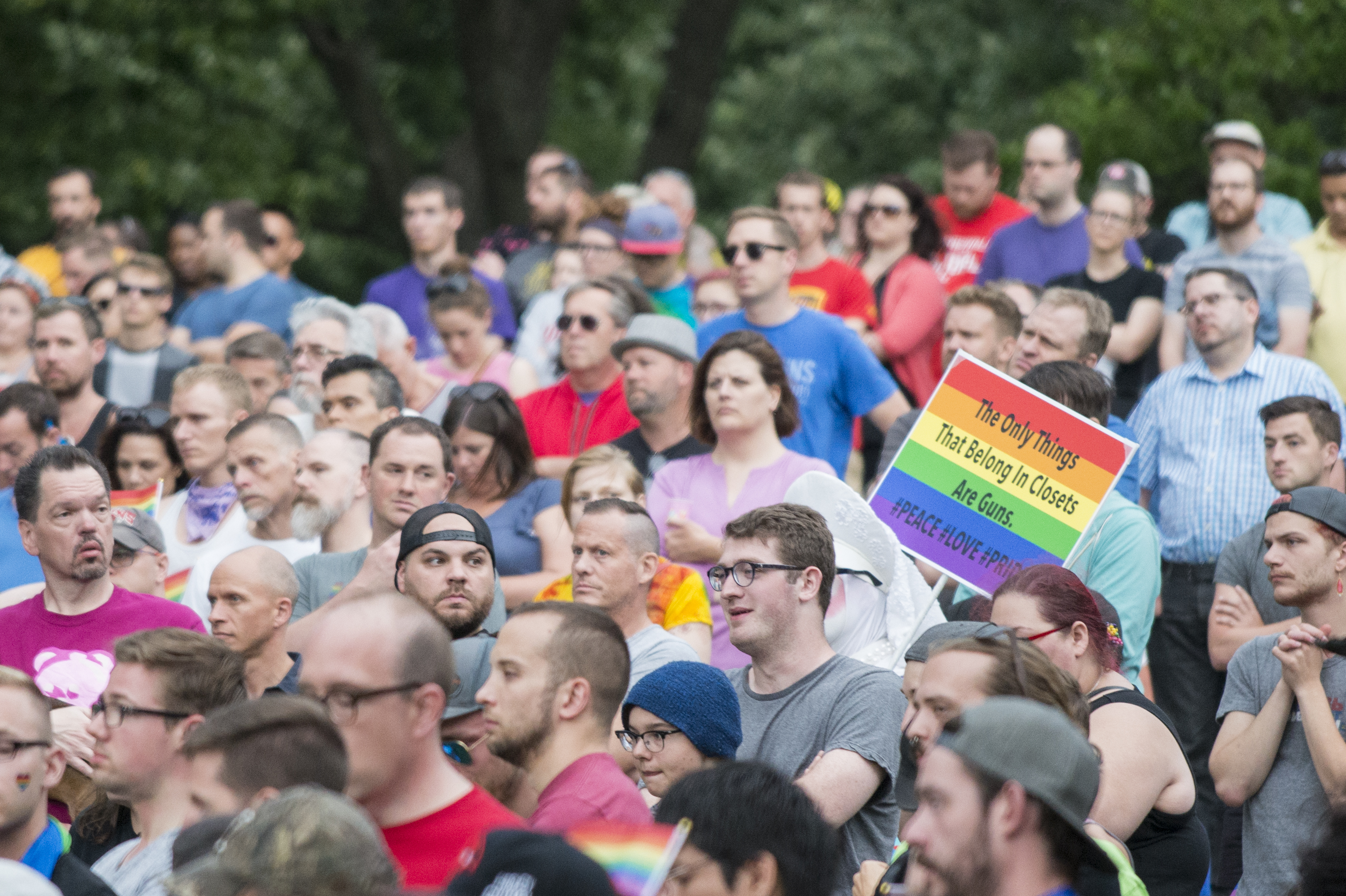 Minneapolis, Minnesota June 12, 2016